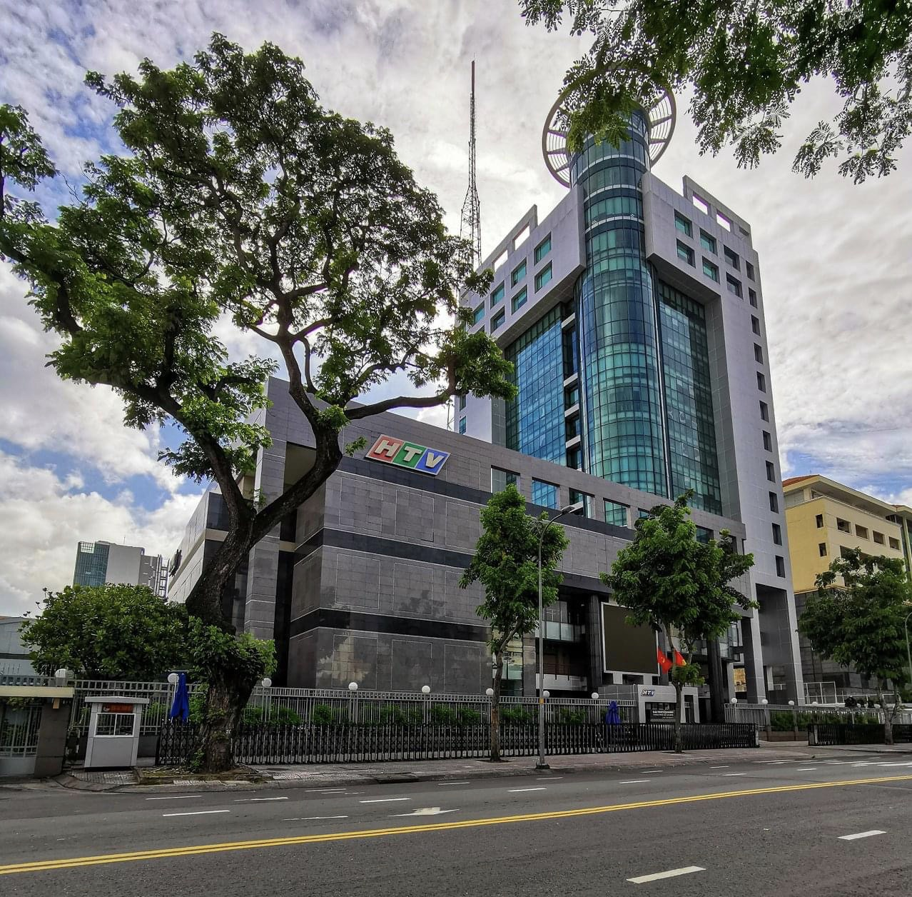 HTV tower 1